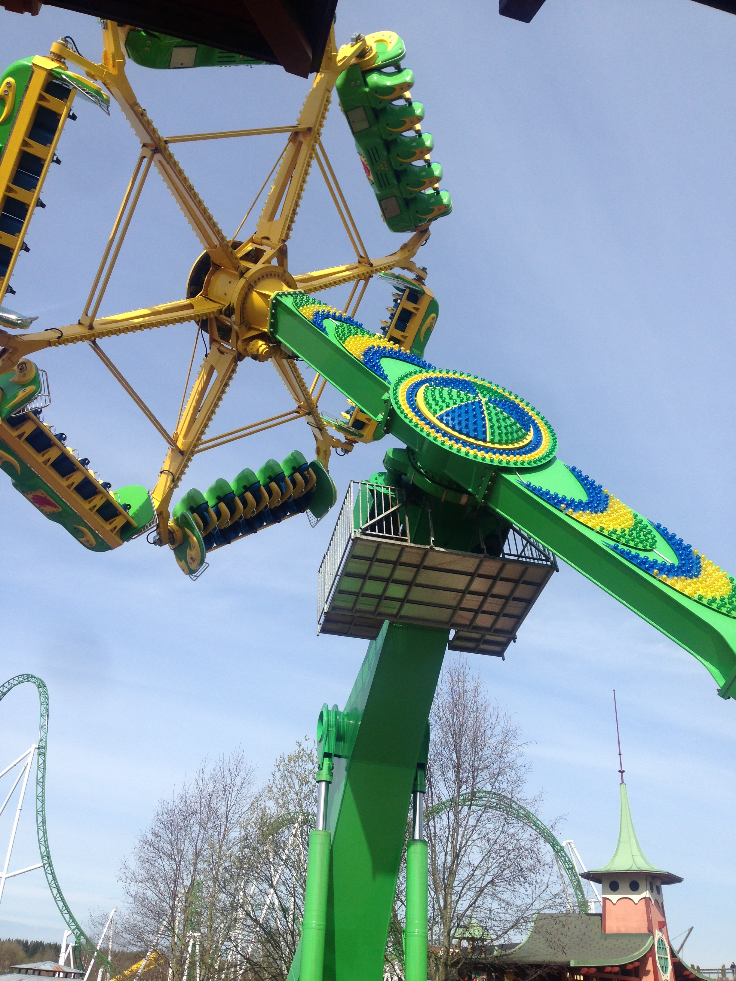 Pegasus